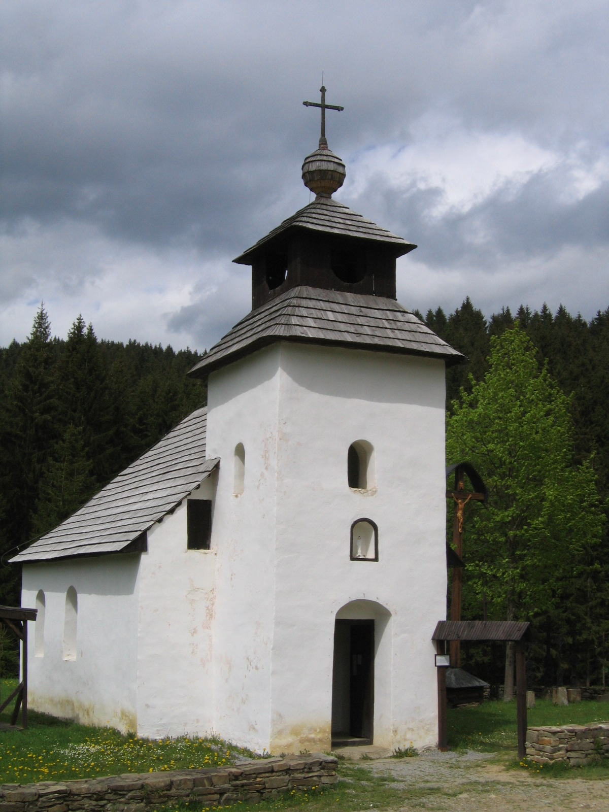 kaplnka zo Zborova nad Bystricou z polovice 19-storočia, ktorá sa dnes sa nachadza v Múzeu kysuckej dediny.